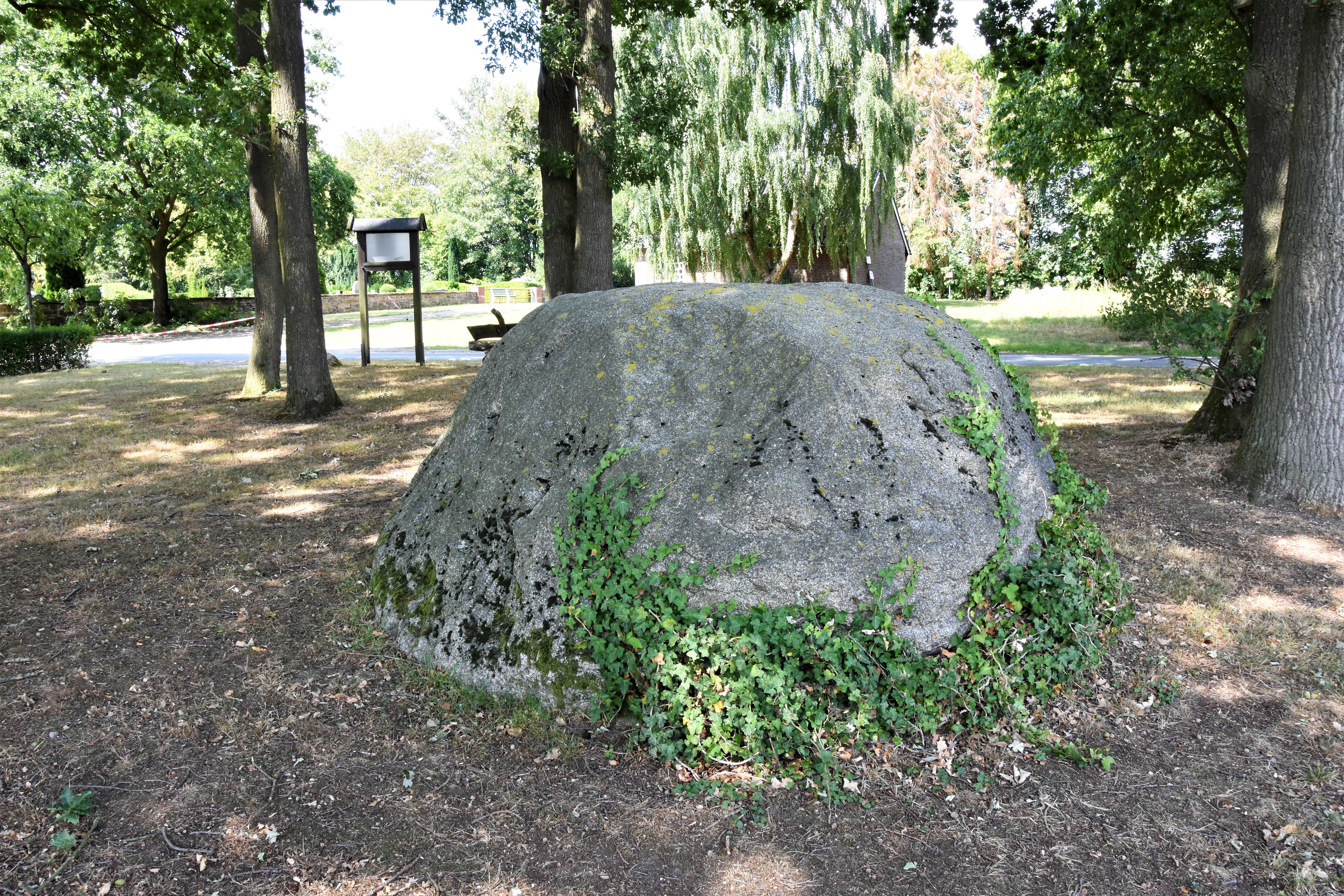 ND OS 00014-Findling „Mathiesings Opferstein“ in Bramsche-Ueffeln am Friedhof.